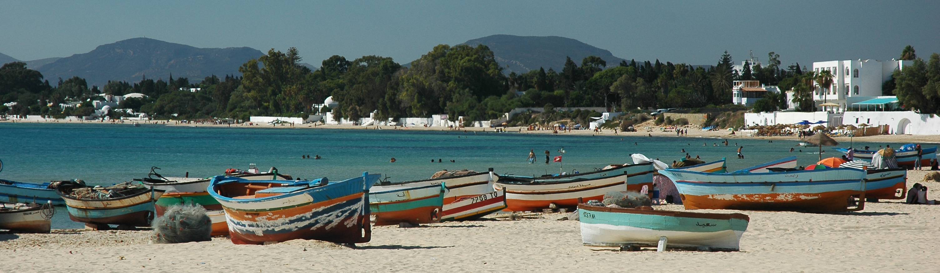 Tunisie Hammamet Photographie prise par Patrick GIRAUD